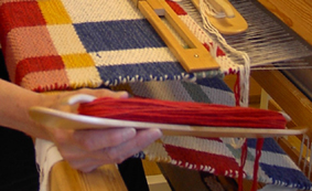 Skyttel för inslag till tex. mattor - garn eller trasor.